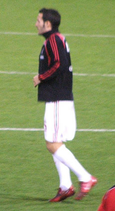 Gianluca Zambrotta